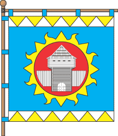 Прапор Ладижина